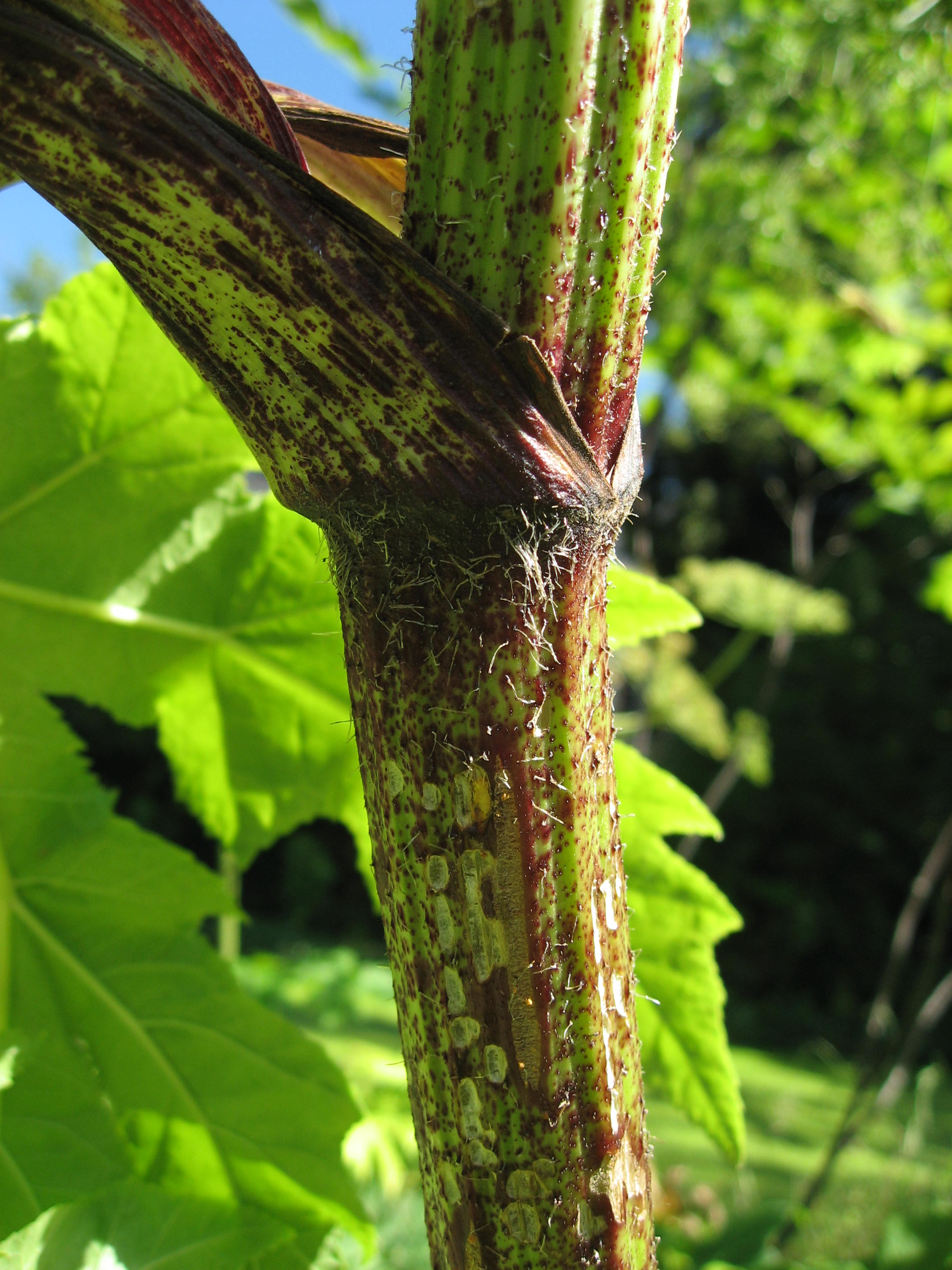 Heracleum mantegazzianum in Musée de l'École de Nancy Map: 48° 40' 49" N 6° 9' 57" E